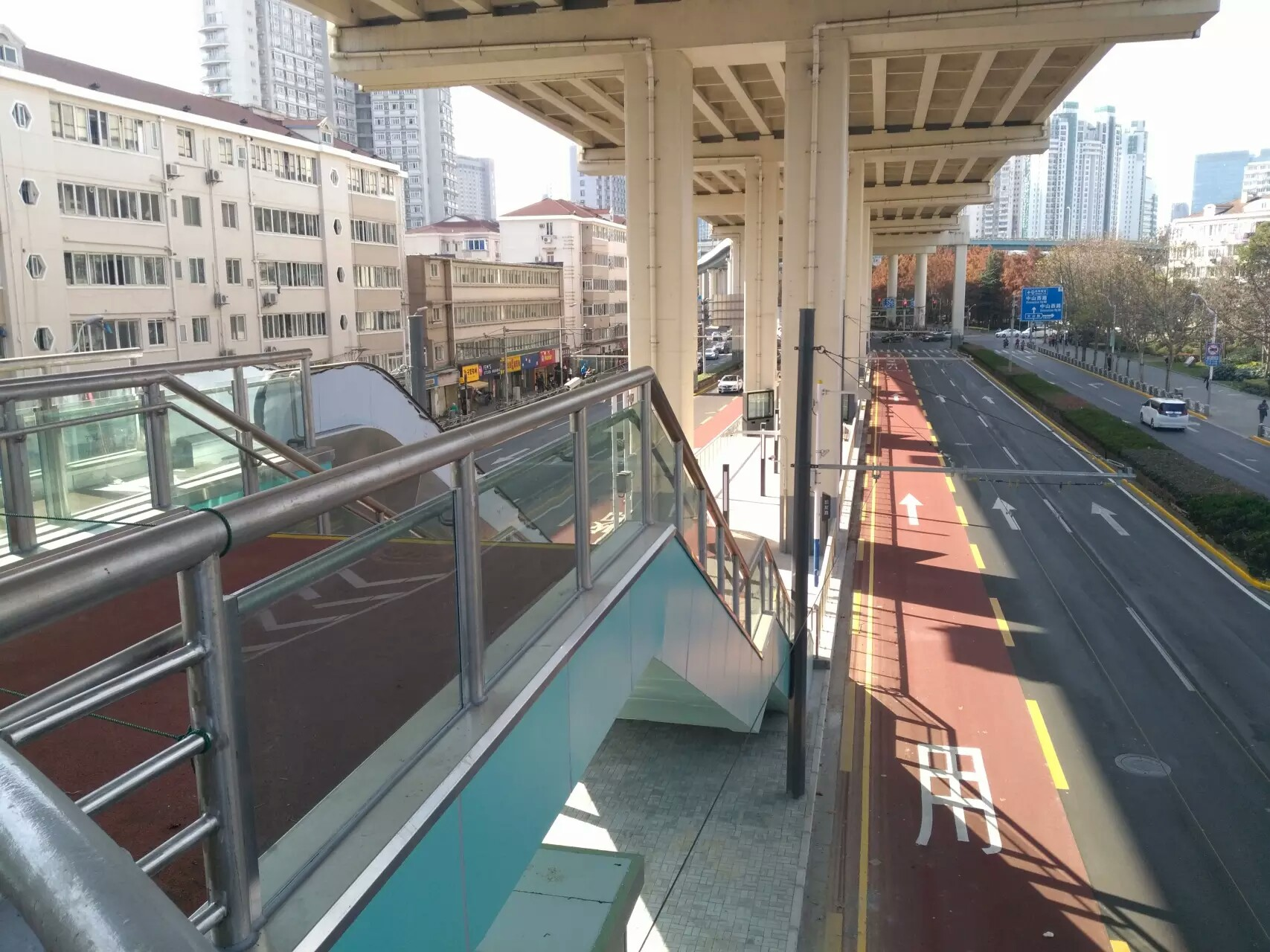 延安路中运量系统——凯旋路站